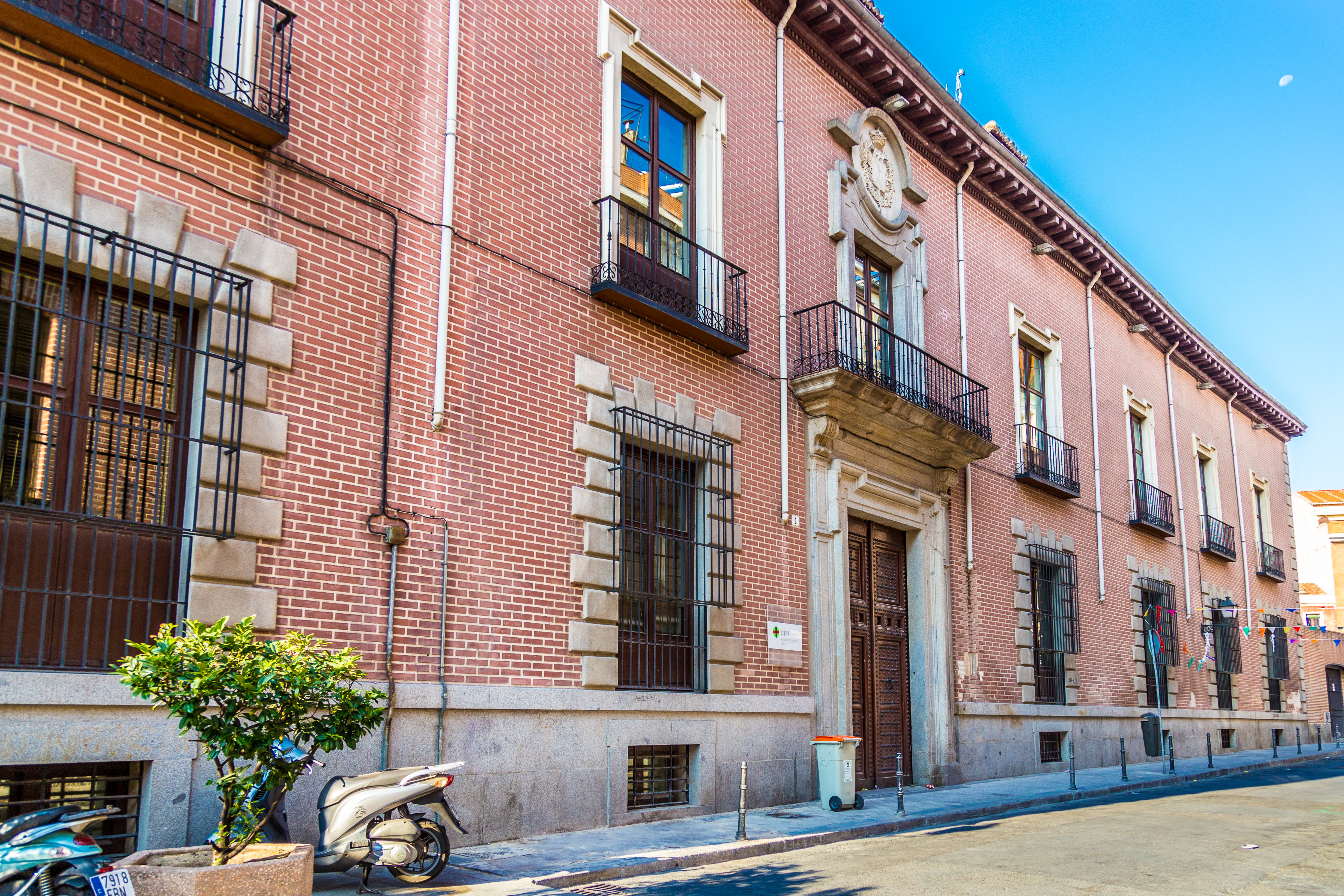 Casa palacio del Duque del Infantado. Calle de Don Pedro, 1, Madrid. Fachada sobre la calle De Don Pedro. 01S.